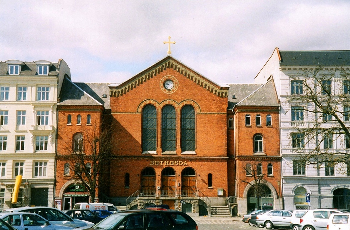 Bethesda (Indre Mission), Københavns Kommune